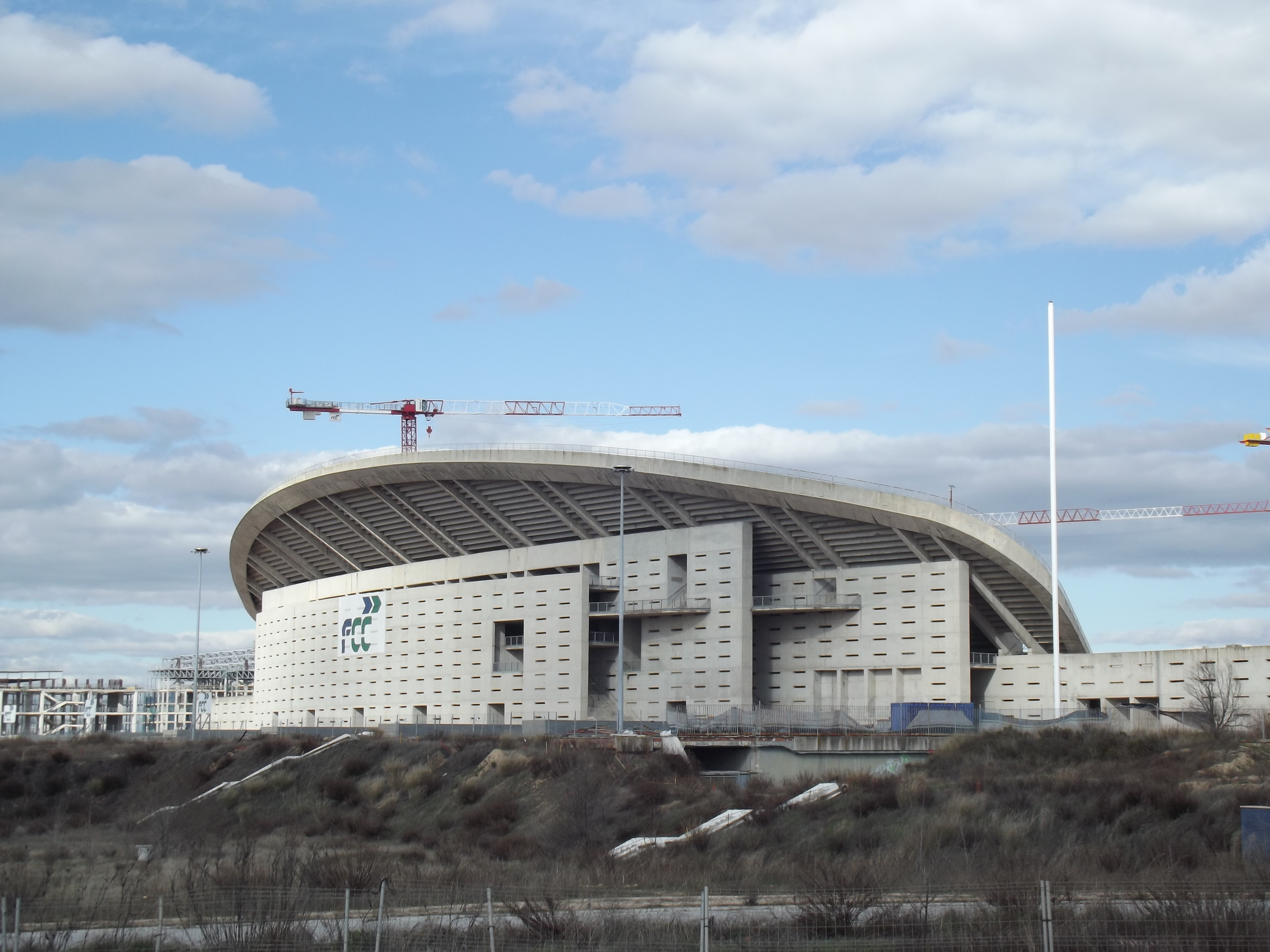 Estadio de La Peineta (February 2014)